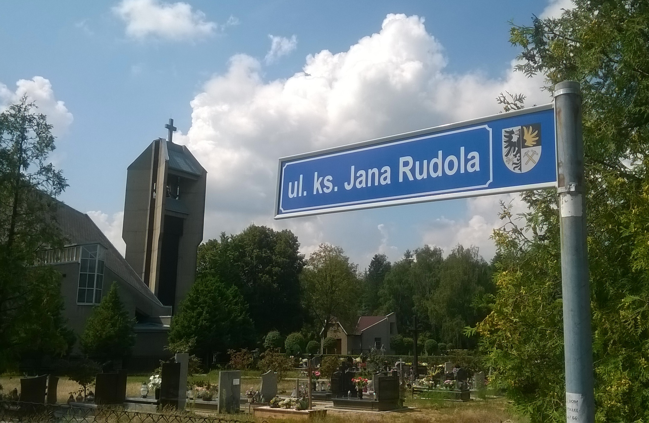 Ulica Księdza Jana Rudola w Tarnowskich Górach